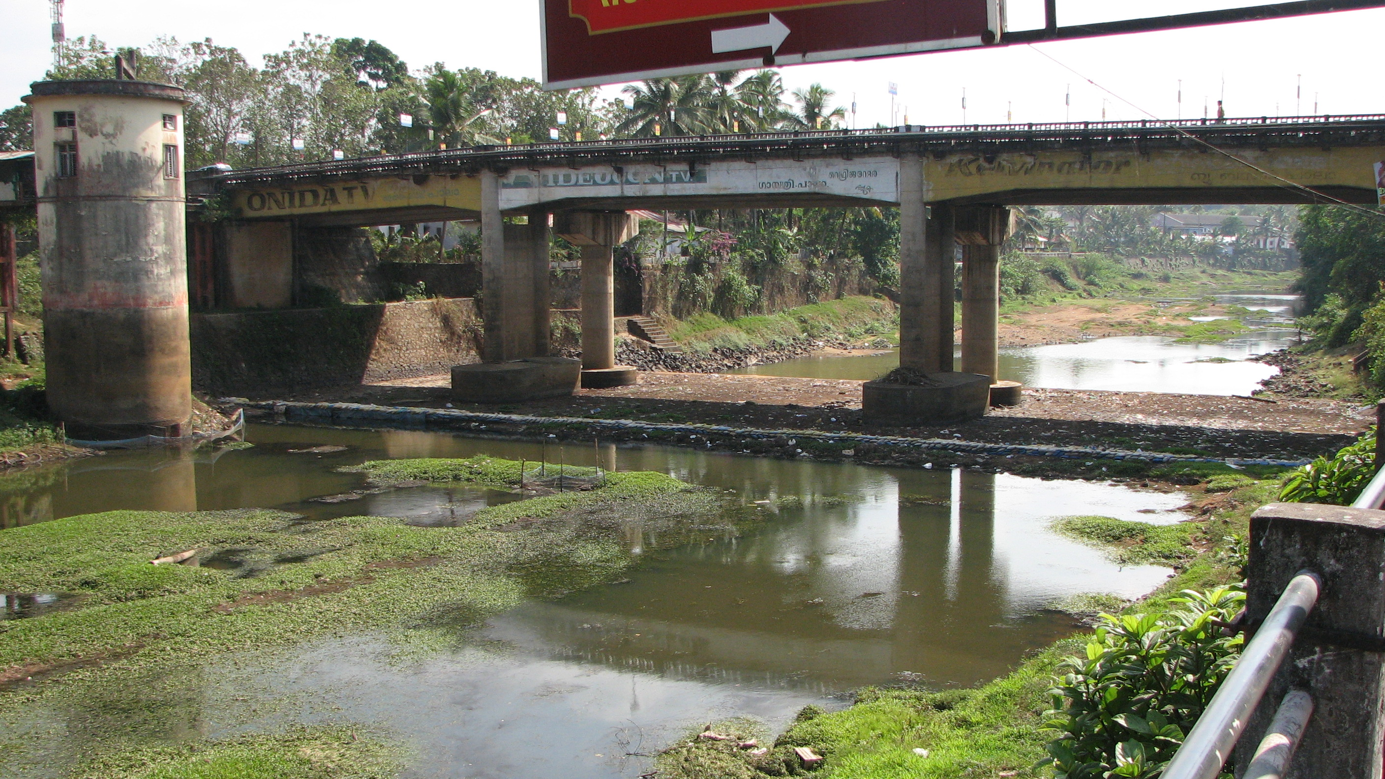 ഒഴുക്കുമുറിഞ്ഞ മീനച്ചിലാർ